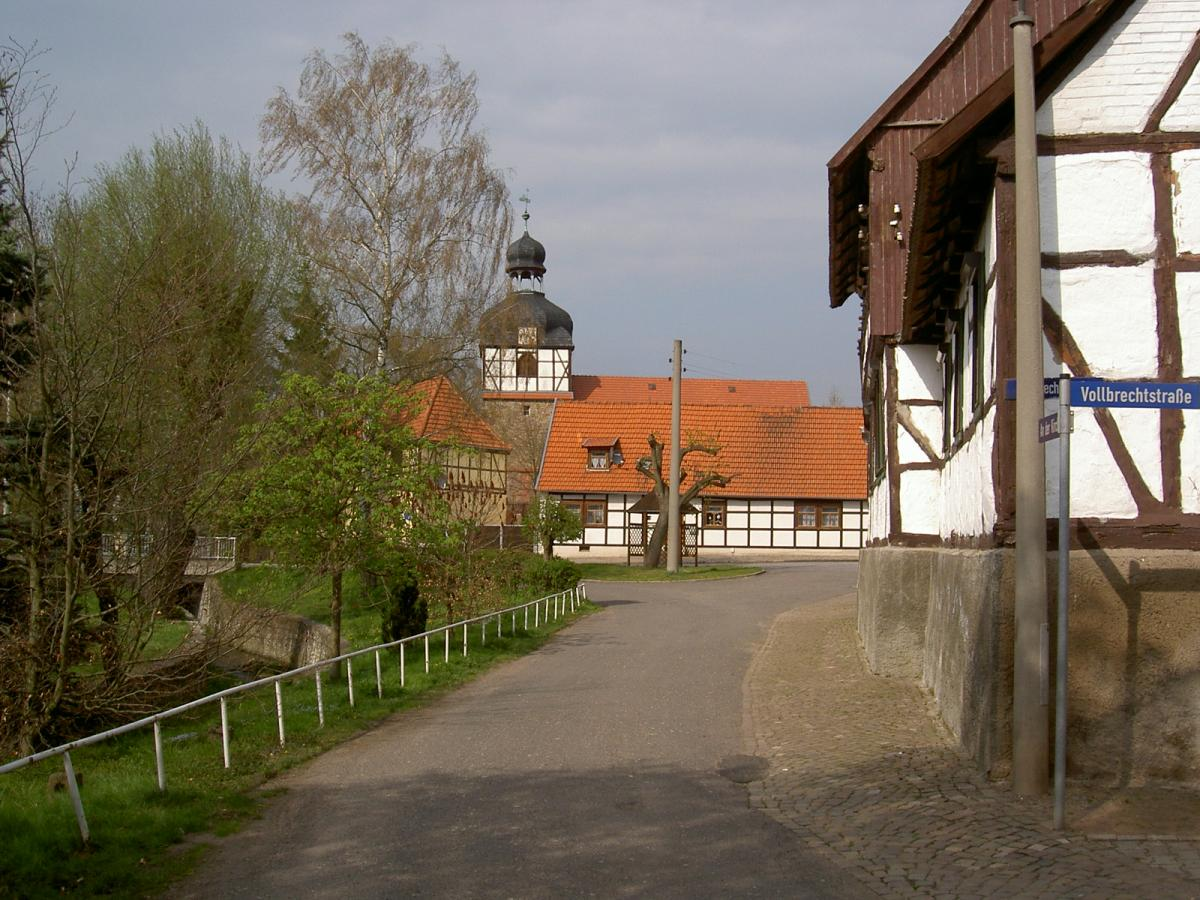 Dorfkern von Uftrungen